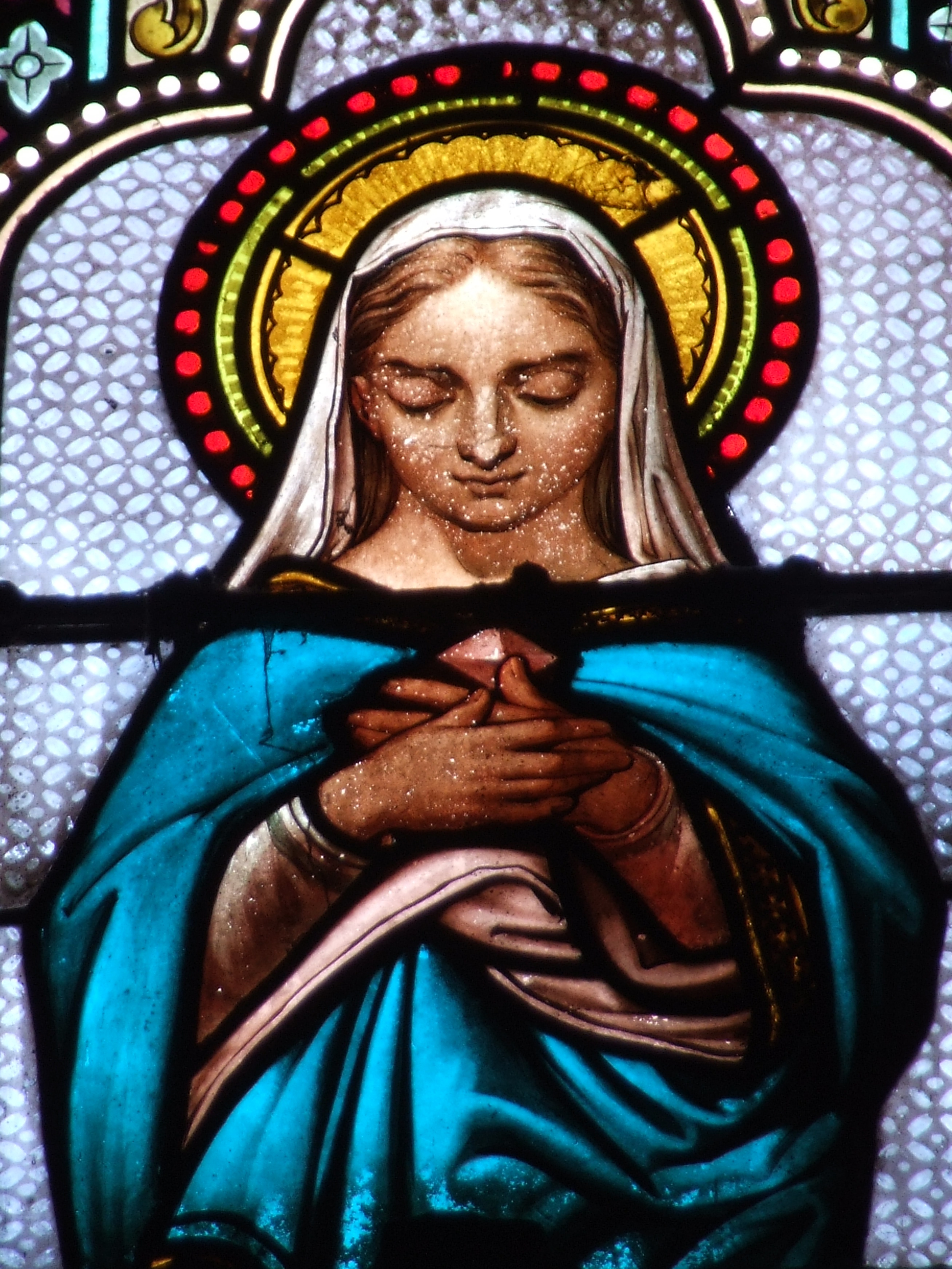 Vierge Marie, église Notre-Dame-de-Marseille, Lisieux église Notre-Dame-de-Marceille, Limoux